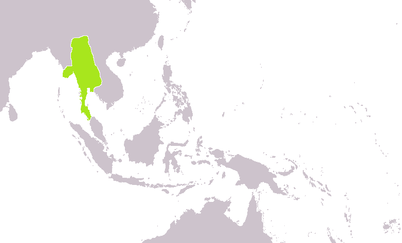 Карта средневекового государства Сукотаи